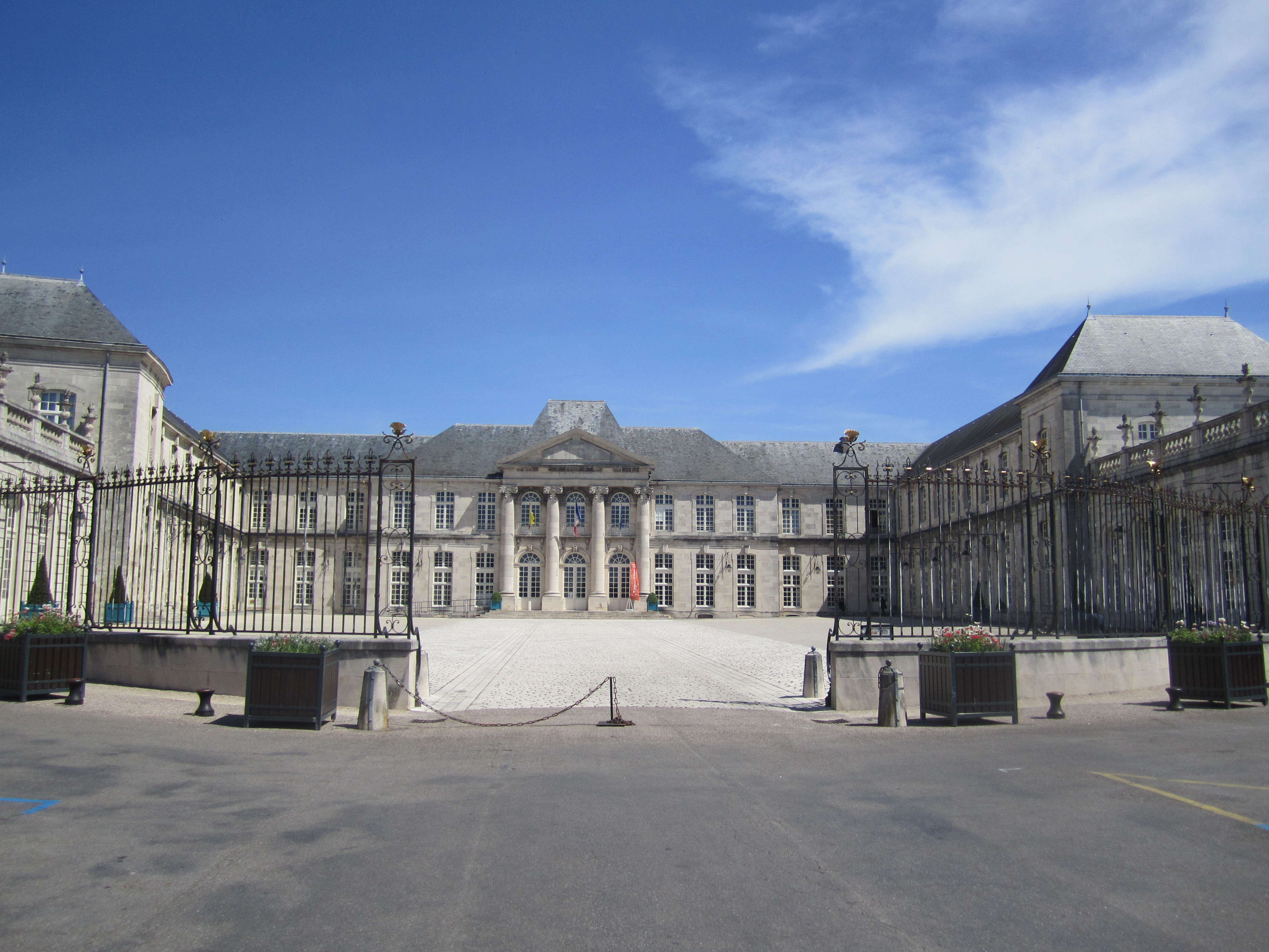 kasteel Commercy